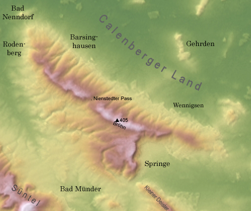 Übersichtskarte vom Deister mit farbigen Höhen